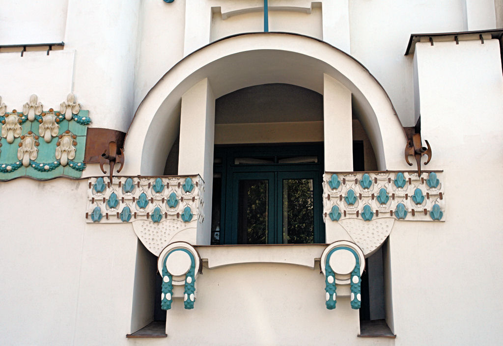 Villa Vojcsik (Vienna, Austria) - Otto Schönthal